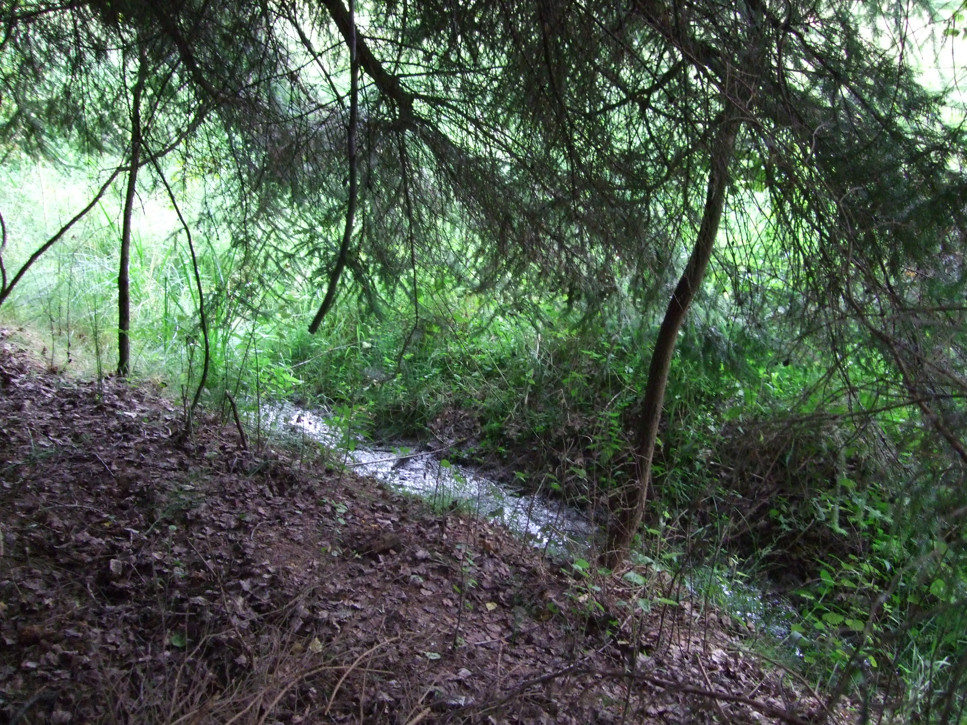 Schlichenbach bei Usingen